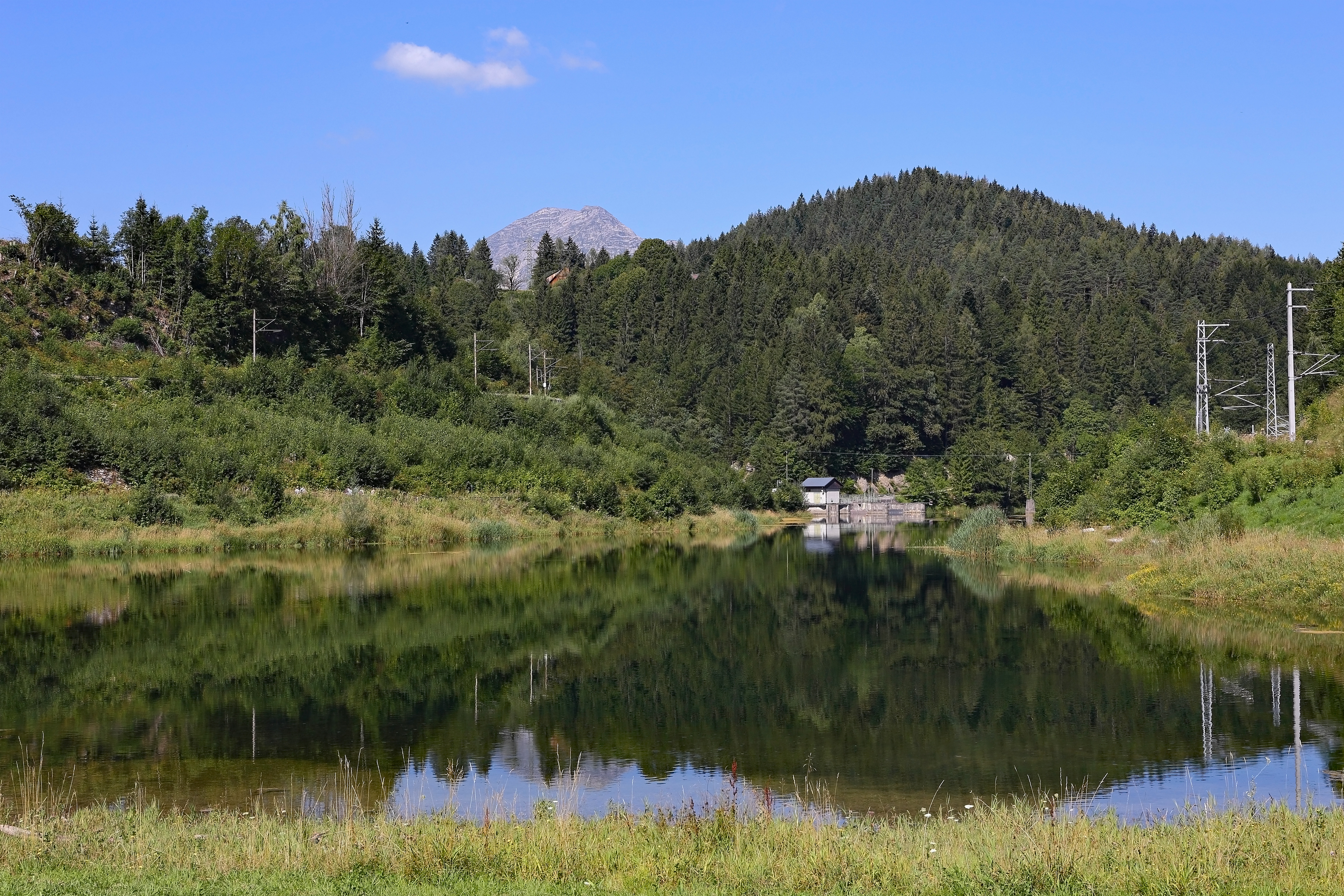 Stausee Wienerbruck im Naturpark Ötscher-Tormäuer